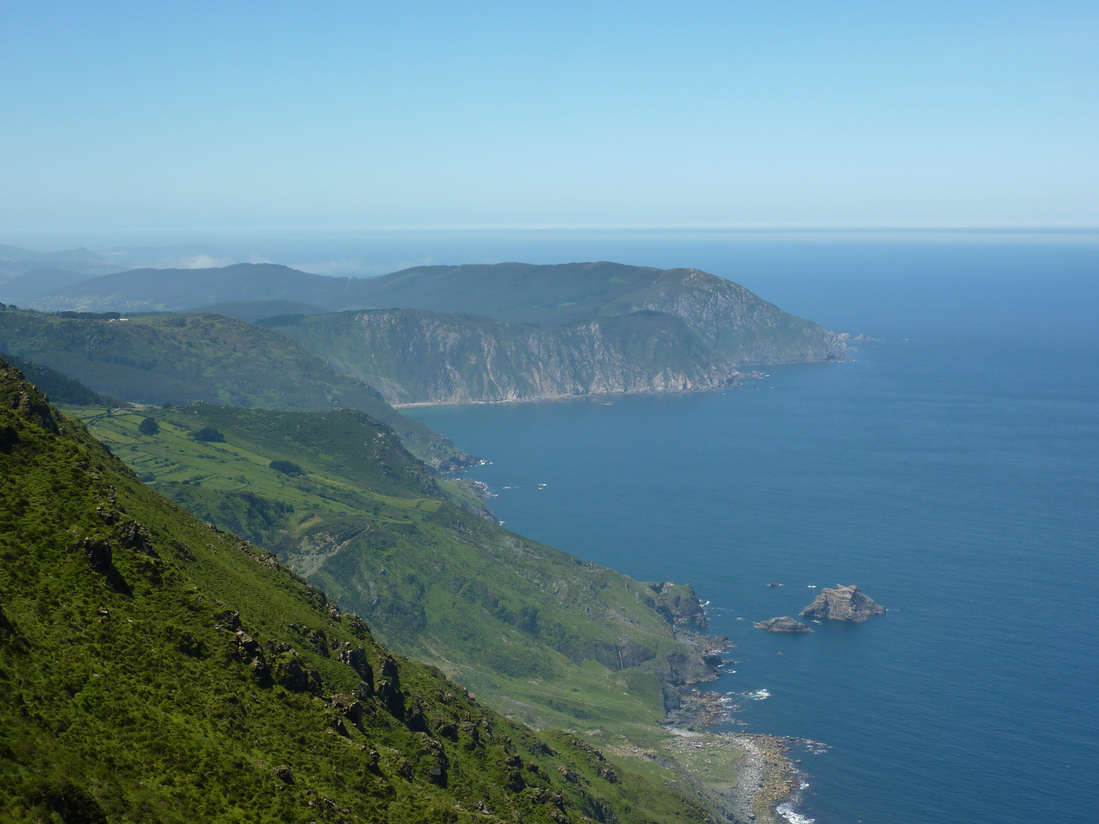 Desde a Garita de Erbeira, perto de Cabo Ortegal